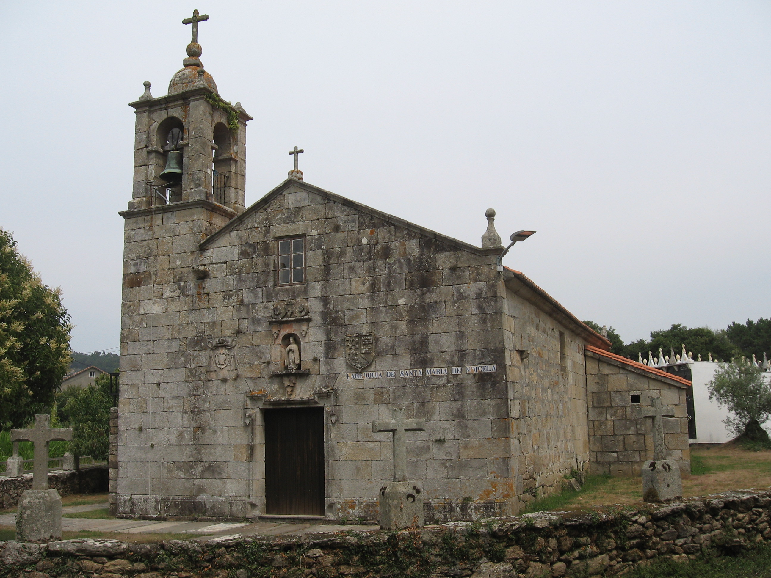 Igrexa Parroquial de Noicela